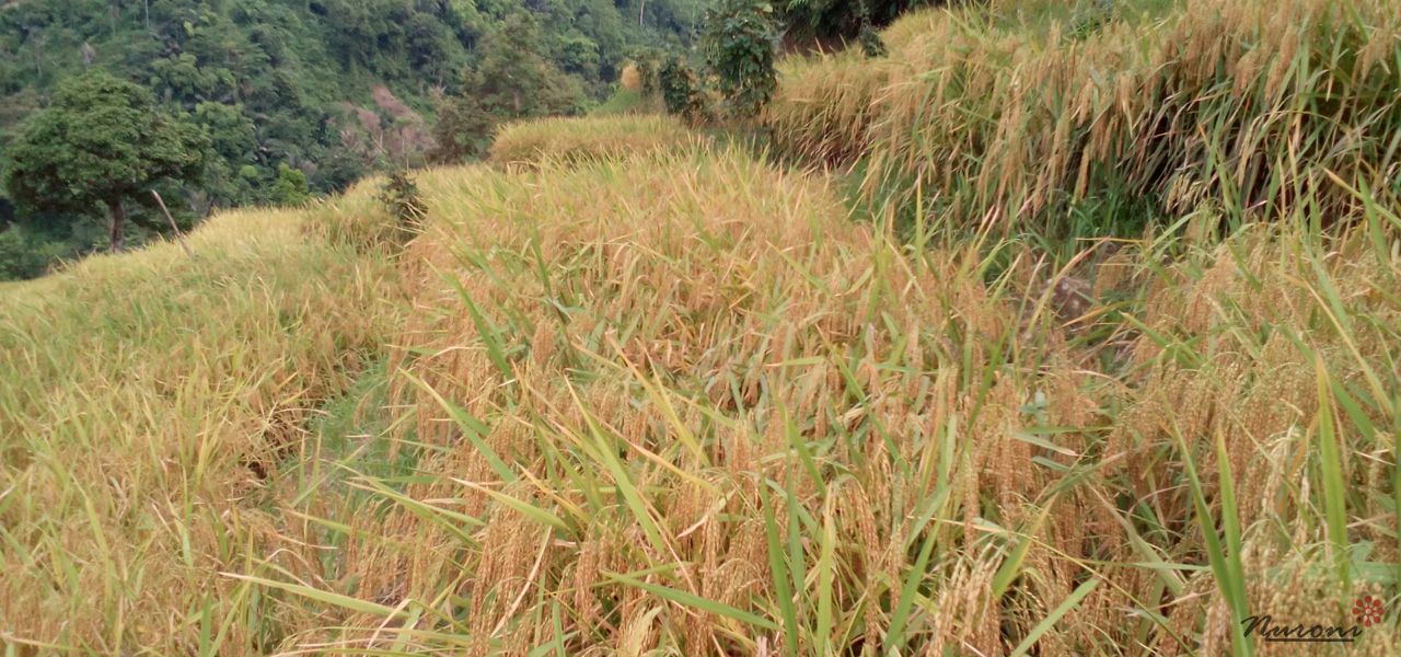 Padi Sawah Nyalindung Pasirhuni Cikadu Menguning